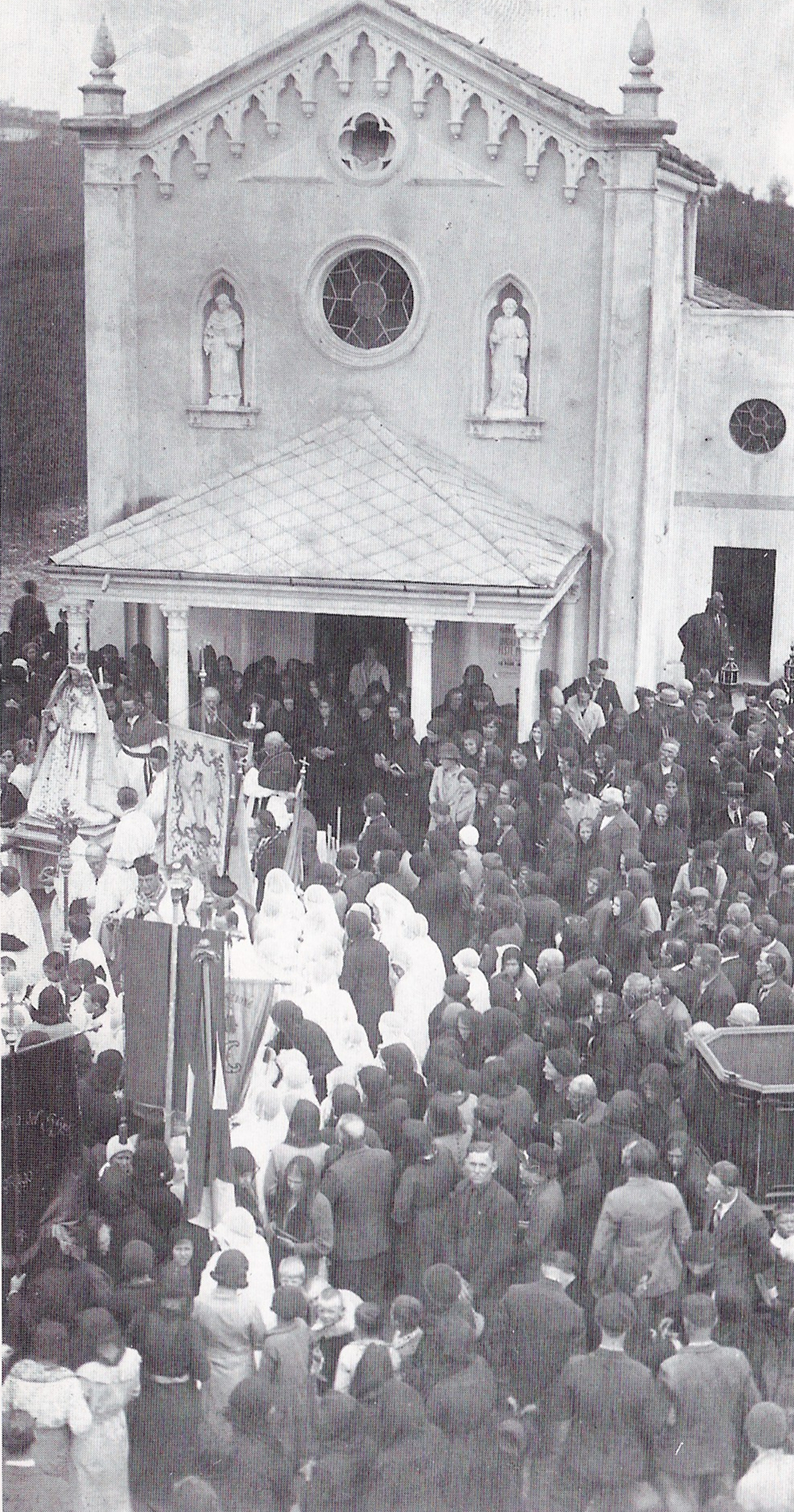 Un momento di una delle processioni avvenute in occasione della nuova chiesa costruita. Madonna delle Grazie, provincia di Vicenza